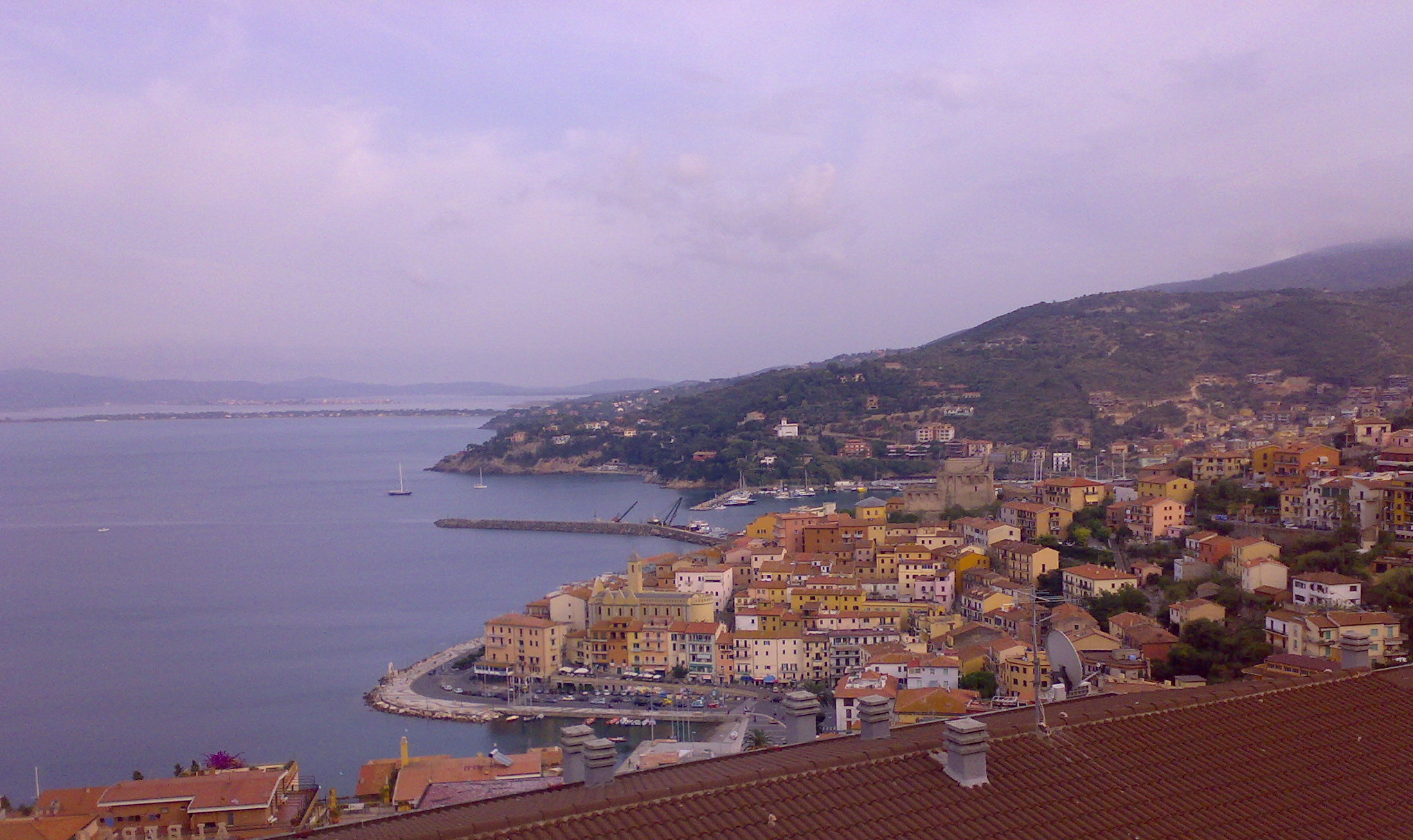 Bellissimo panorama di Porto S.Stefano dalla strada del sole. Sullo sfondo il tombolo di Giannella.